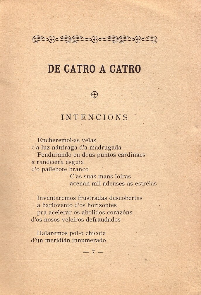 De catro a catro, "Intencións"